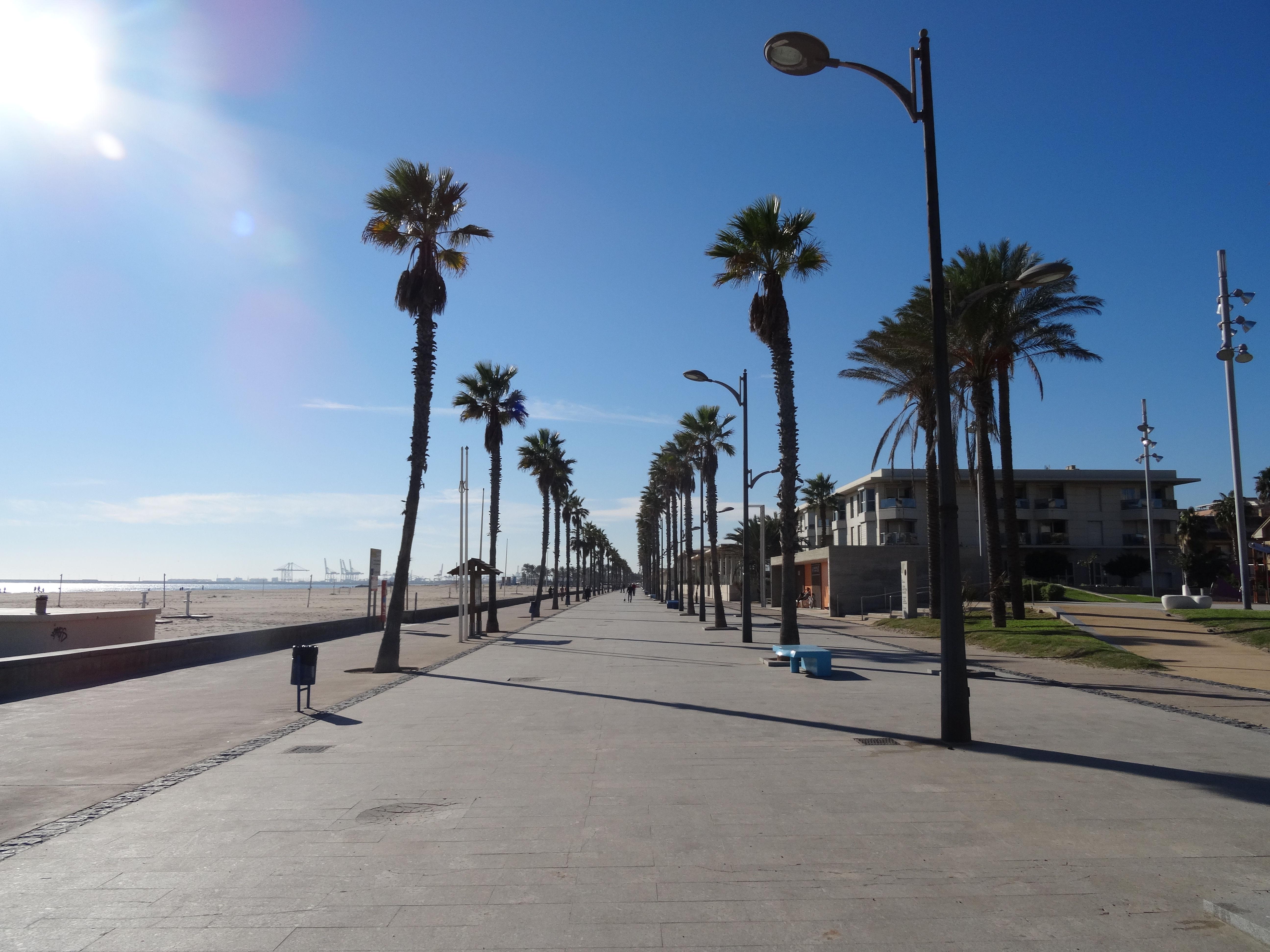 Amplio paseo marítimo en la playa de la Patacona donde es frecuente ver a gente paseando y haciendo deporte.